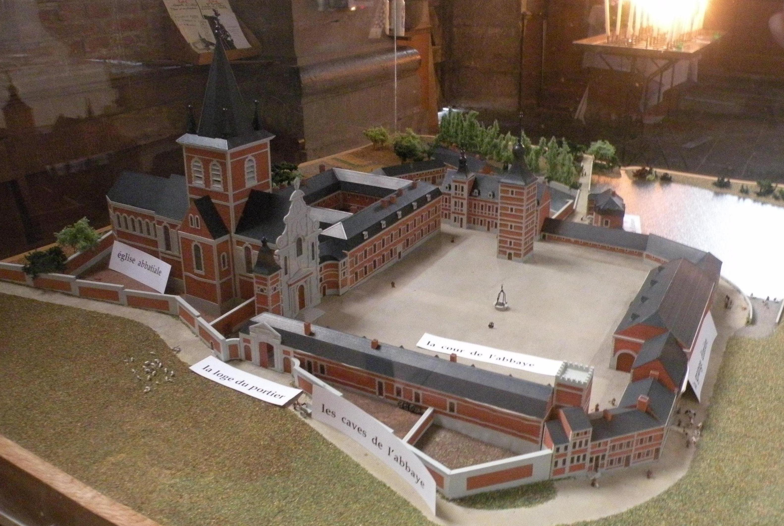 maquette de l'abbaye de maroilles, nord, france : réalisée en 1982 par M. Leplus